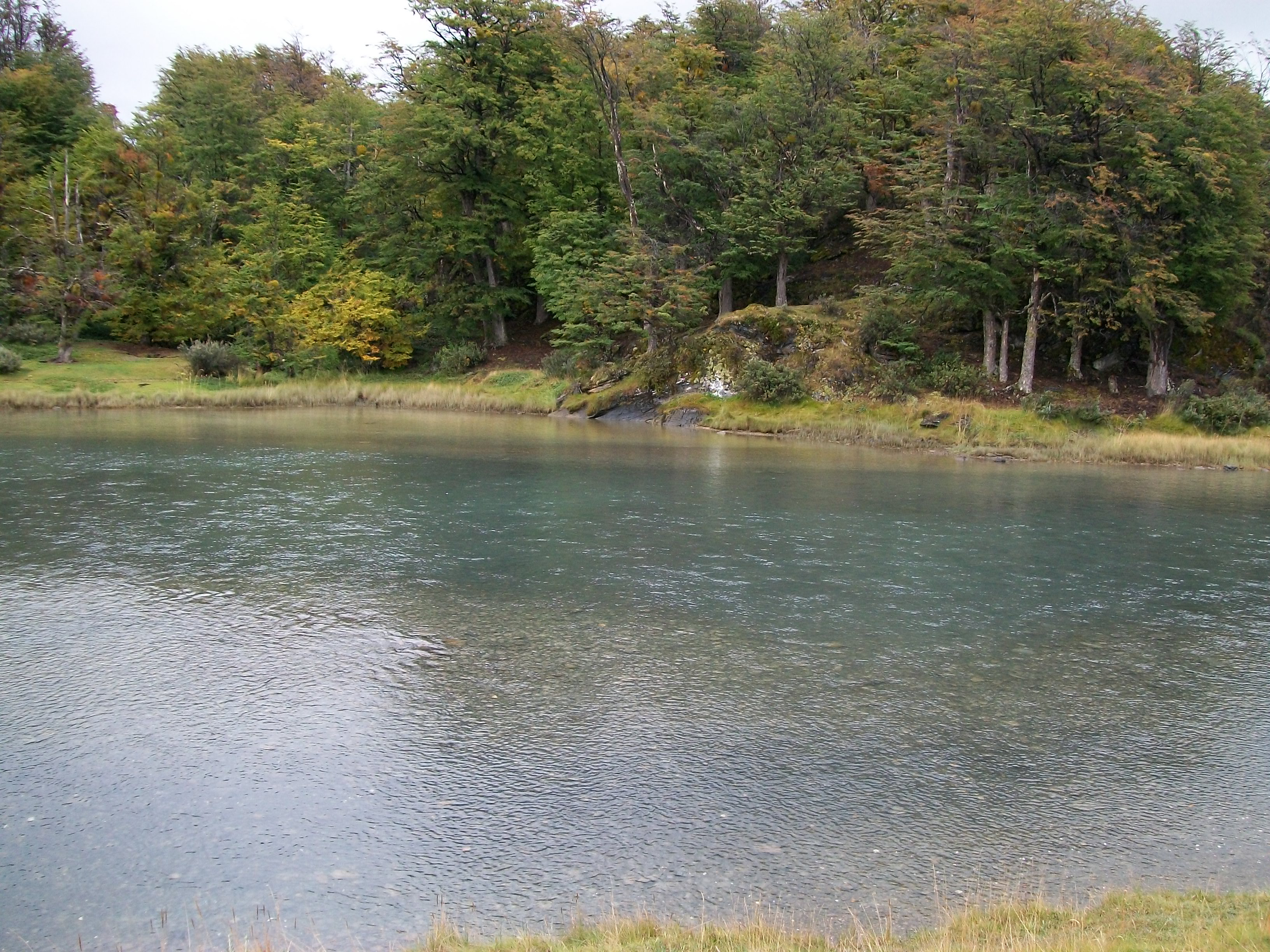 Parque Nacional de Tierra del Fuego - Vista del Río Lapataia